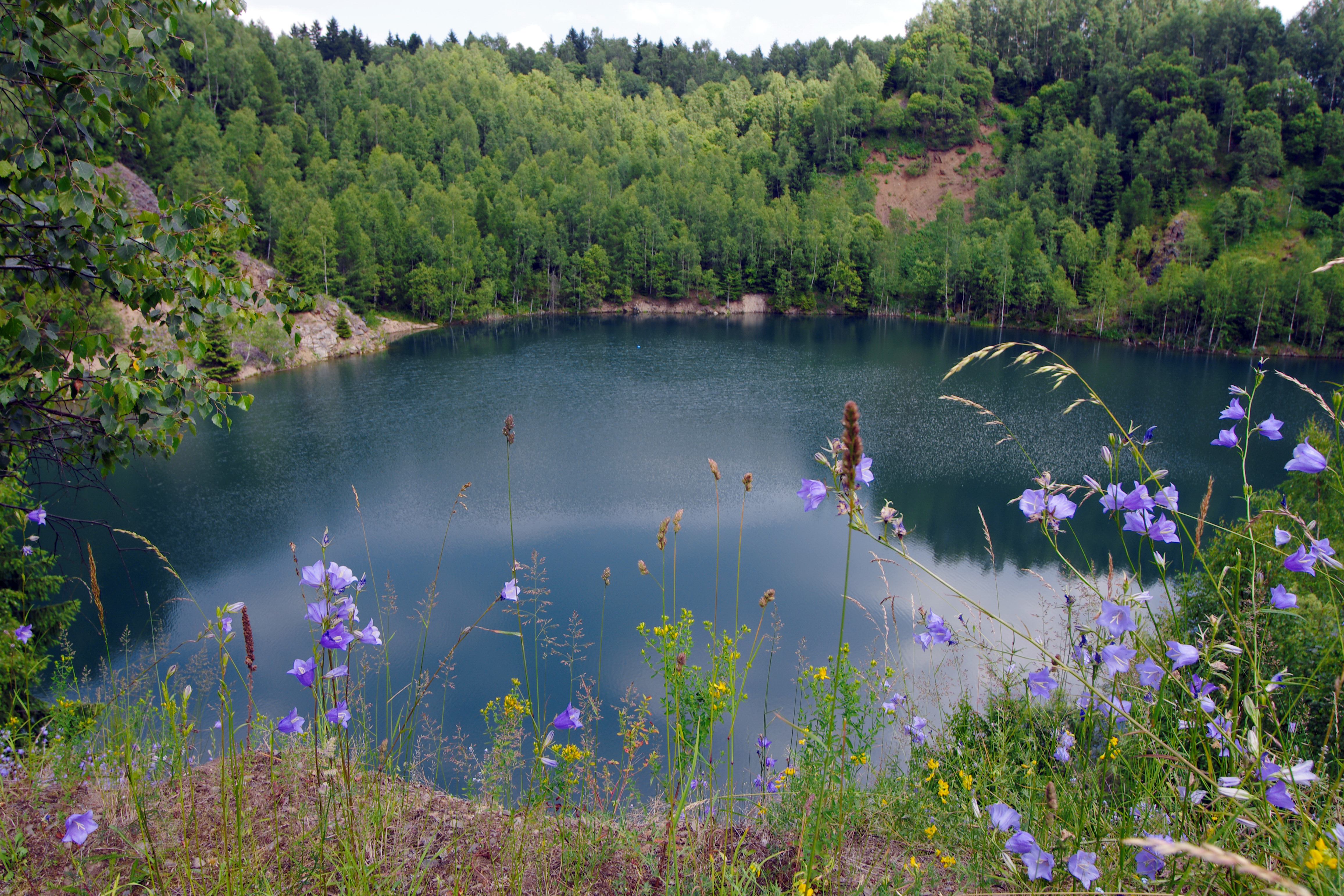 Jindřichovice, Krušné hory, Kernberg zatopený lom; více